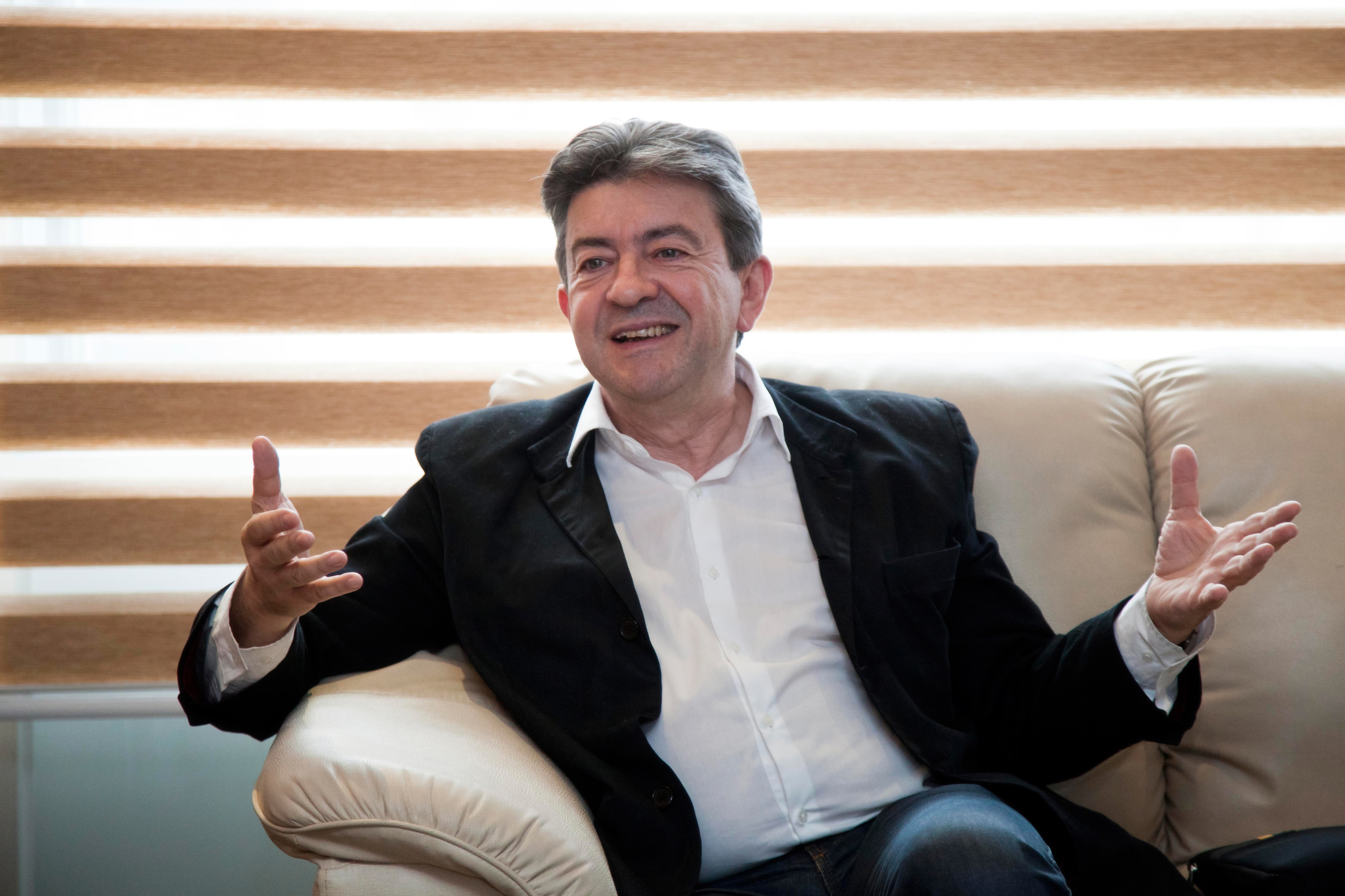 Quito (Ecuador), 16 de Julio 2013. El Canciller Ricardo Patiño recibió en su despacho al ex Ministro de Educación de Francia, Jean-Luc Mélenchon, previo a la Conferencia "Crisis Europea y Políticas Alternativas" que será ofrecida en CIESPAL. Foto: Fernanda LeMarie - Cancillería del Ecuador.